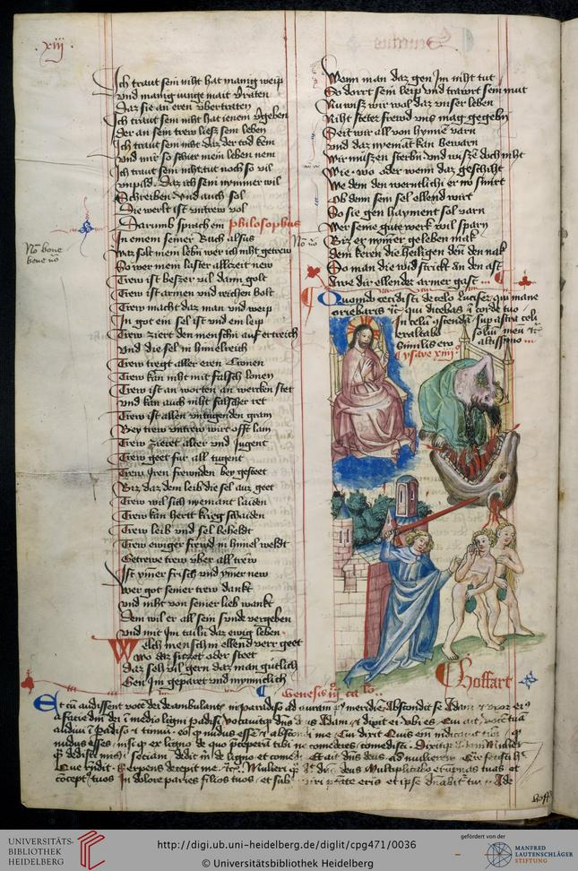 Hugo von Trimberg "Der Renner"